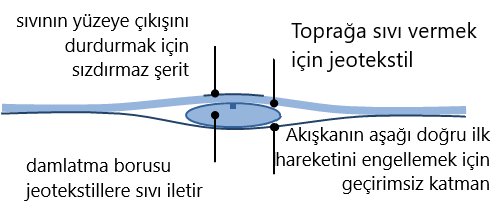 Örnek bir yüzey altı tekstil sulama kurulumunun yapısını gösteren şema.